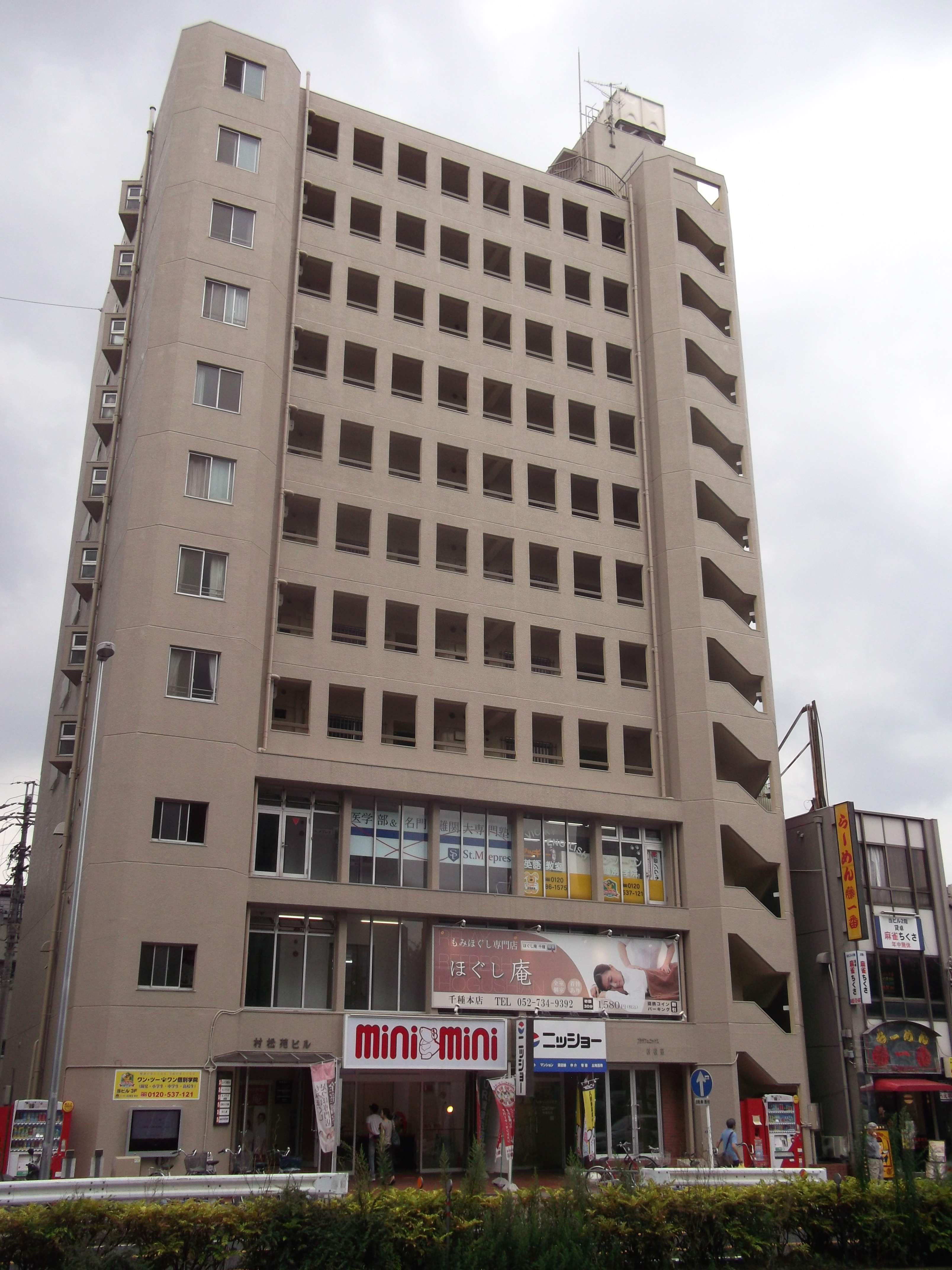 名古屋市千種区村松苑ビルを北側公道東側より撮影